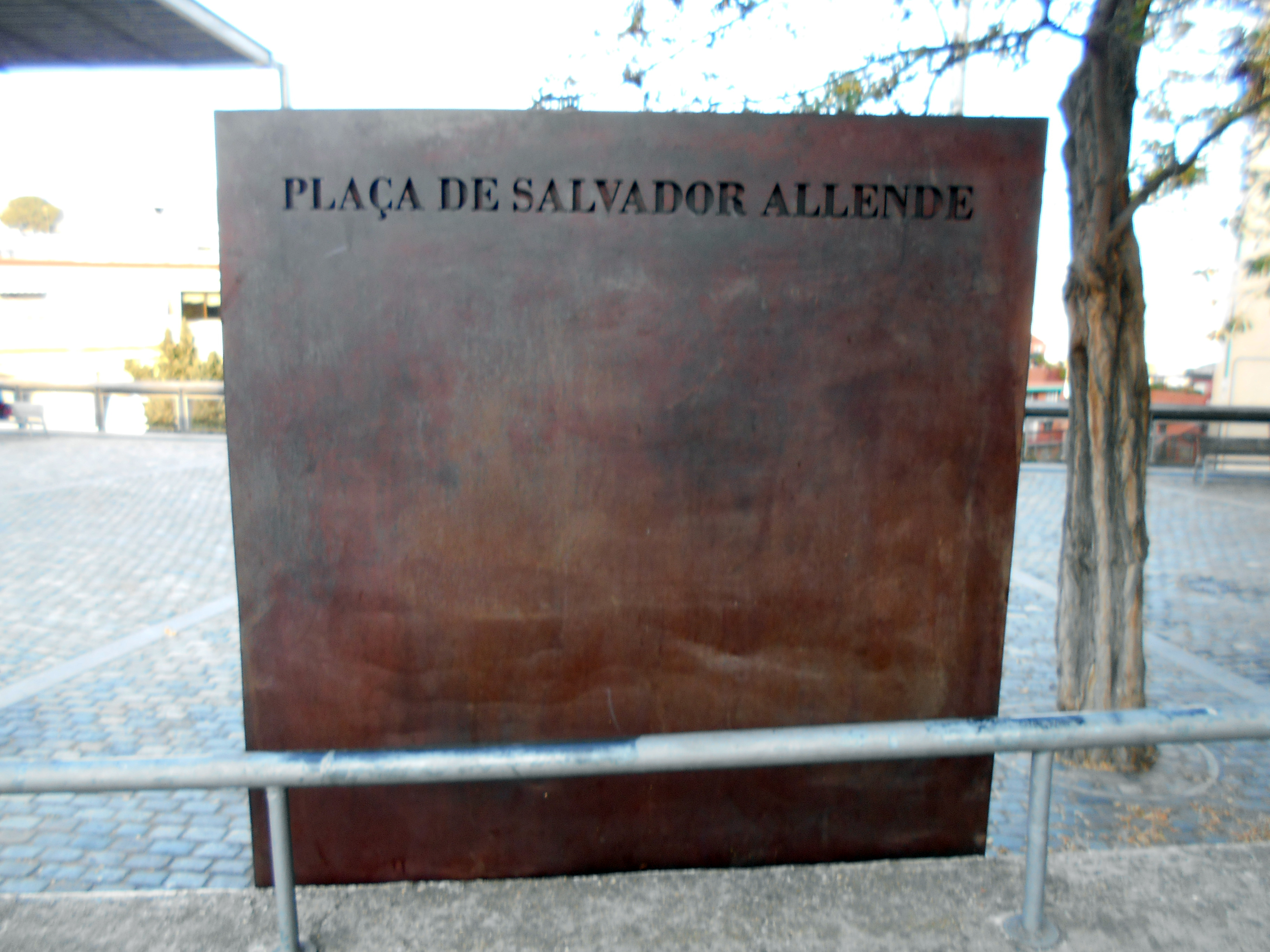 Plaza de Salvador Allende.